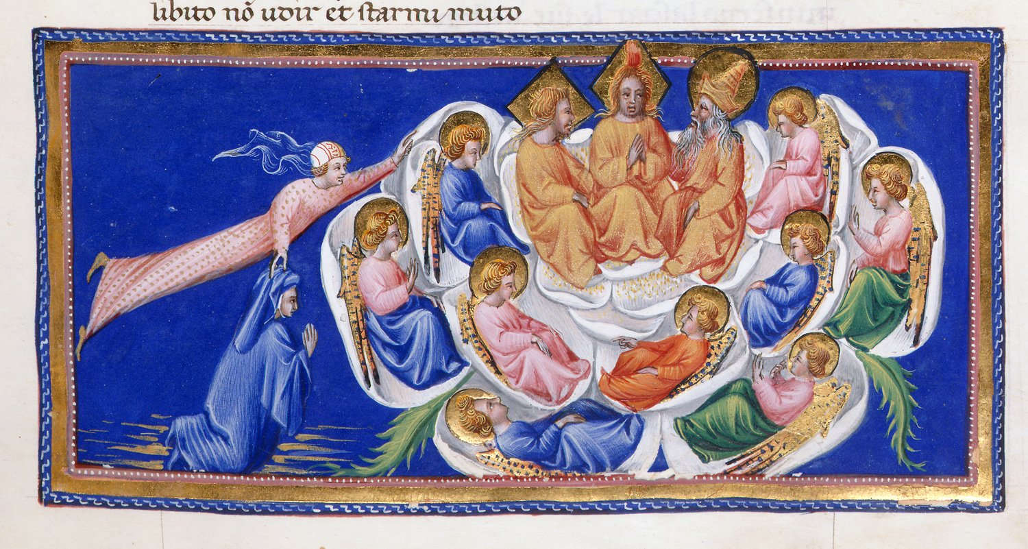 Giovanni di paolo, paradiso 57 rosa celeste.jpg